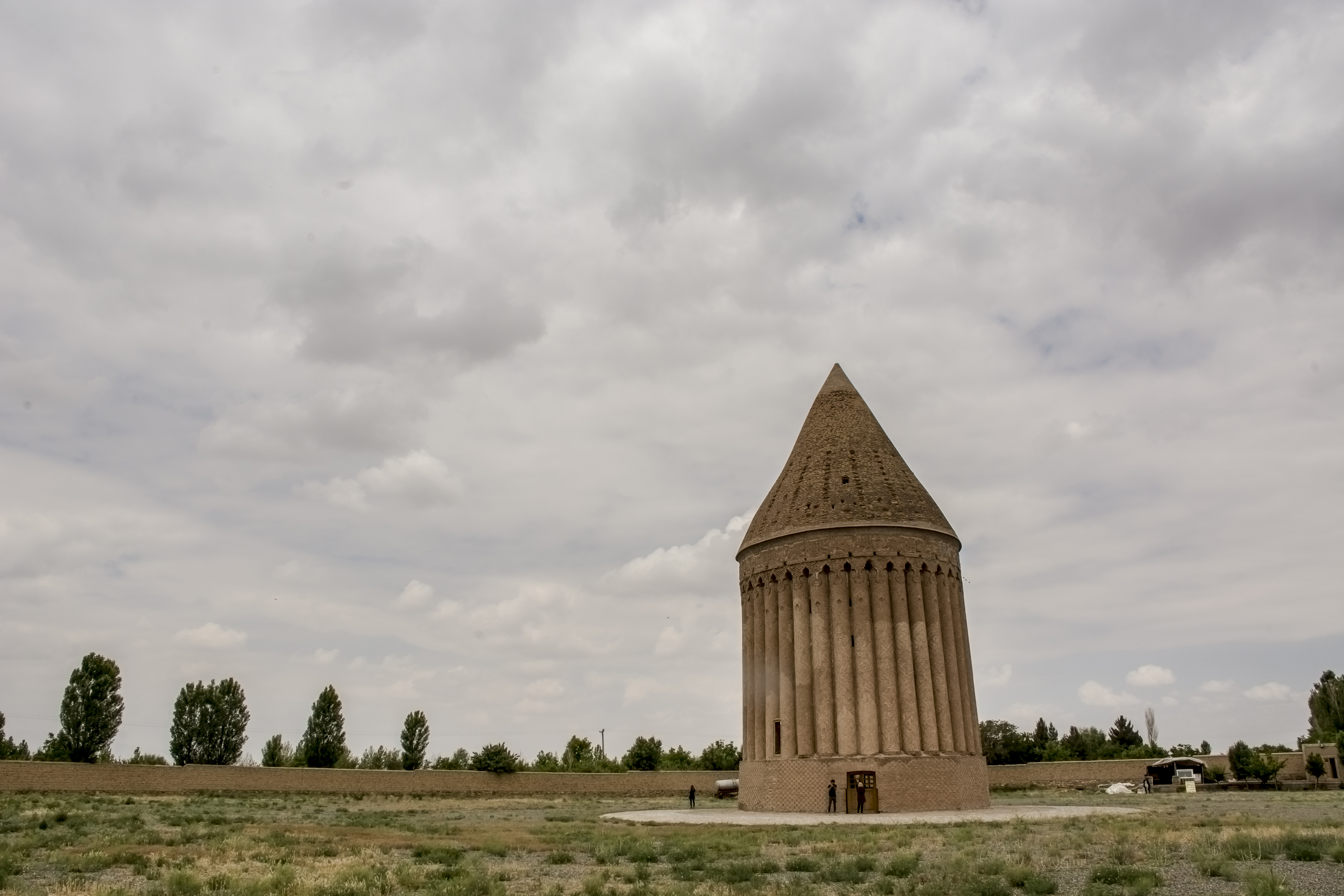 برج رادکان توس ، اثر ریاضی دان، ستاره شناس و دانشمند بزرگ ایرانی، حکیم خواجه نصیرالدین توسی است. برج رادکان مشهد یا میل رادکان بر روی دشت میان توس و رادکان قرار گرفته و همتای دیگر آن در شهر کردکوی واقع شده که به رادکان غربی مشهور است. این بنا که از آثار قرن هفتم هجری قمری بوده ، در فاصله ۷۴ کیلومتری شمال مشهد و ۲۶ کیلومتری شمال غربی چناران واقع شده است. میل رادکان دارای گنبدی مخروطی شکل است که ساختمان آن احتمالا در سال ۶۰۷ هجری قمری به پایان رسیده است. برج رادکان مشهد دارای گنبد مخروطی شکل است و ارتفاع این برج ، ۳۵ متر، قطر داخلی‌اش ۱۴ متر و قطر خارجی آن ۲۰ متر می‌باشد. منظر بیرونی بنا تا ارتفاع ۲.۵ متری به شکل ۱۲ ضلعی و از آن جا تا زیر گنبد به صورت ۳۶ ترک نیم ستونی ساخته شده است. برج رادکان ، ۱۲ دیوار خشتی پهن و بلند دارد که برج را به ۱۲ بخش ۳۰ درجه ای تقسیم می کنند. یعنی هر دیواره ۳۰ درجه از زاویه افق را در بر می گیرد. این در حالی است که دیوارها دو به دو با هم موازی هستند و بر هر کدام از آنها، ۳۶۵ ترک نیم ستونی وجود دارد که برج را به ۳۶ ترک ۱۰ درجه ای تقسیم می کنند.